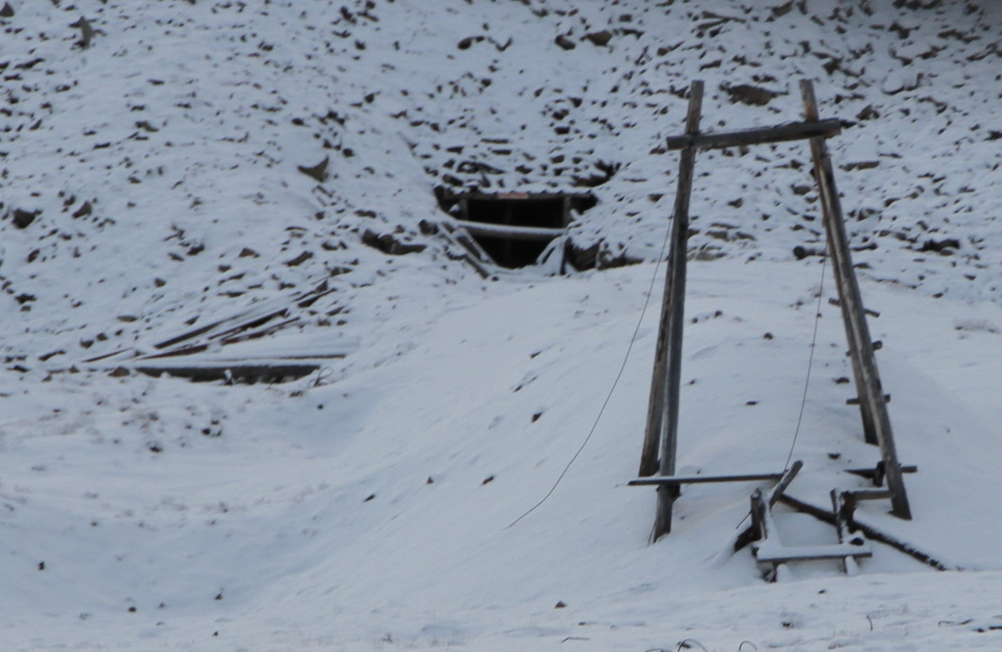 Old mine facilities in Plataaberget / Gruve 3, longyearbyen, Spitsbergen (Norway)